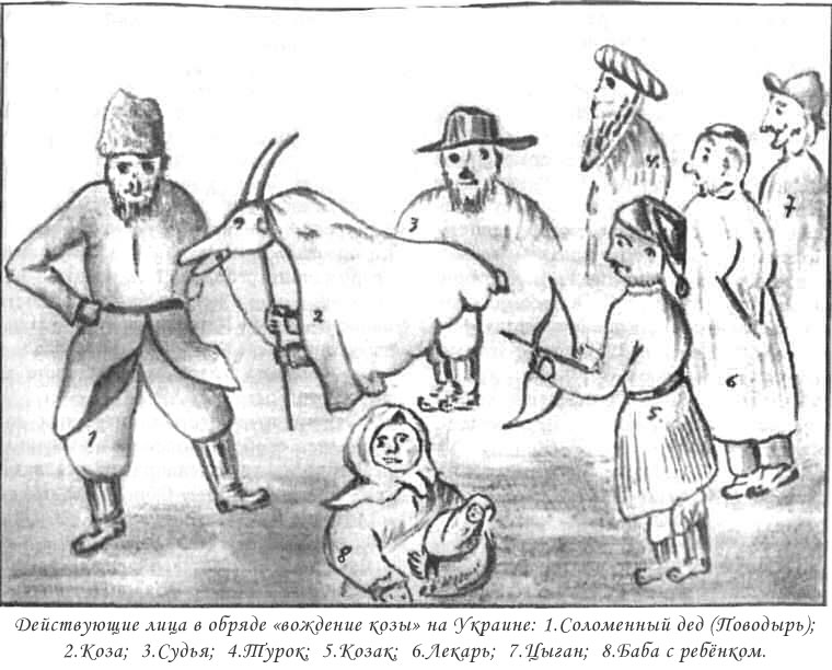 Рисунок Л. С. Ленчевского и Т. Н. Сафоновского к этнографическому описанию обряда «Коза» 1926 г. (с. Кунча, окр. г. Шепетовка, Украина). В подписи под рисунком перечислены персонажи: 1) Соломенный дед, 2) Коза, 3) Судья, 4) Турок, 5) Казак, 6) Врач, 7) Цыган, 8) Баба с ребенком